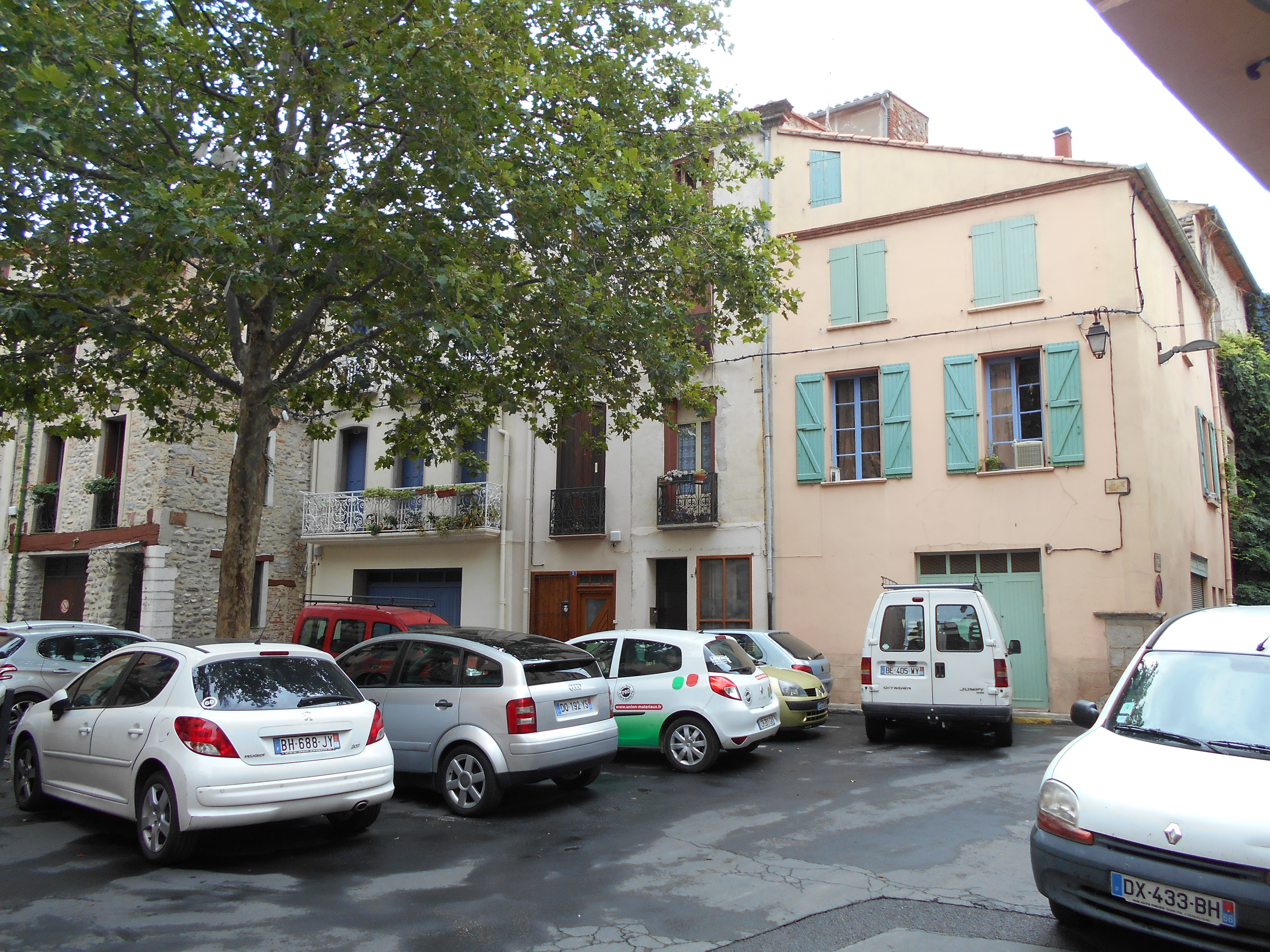 Lloc on era la Santa Creu d'Illa 2